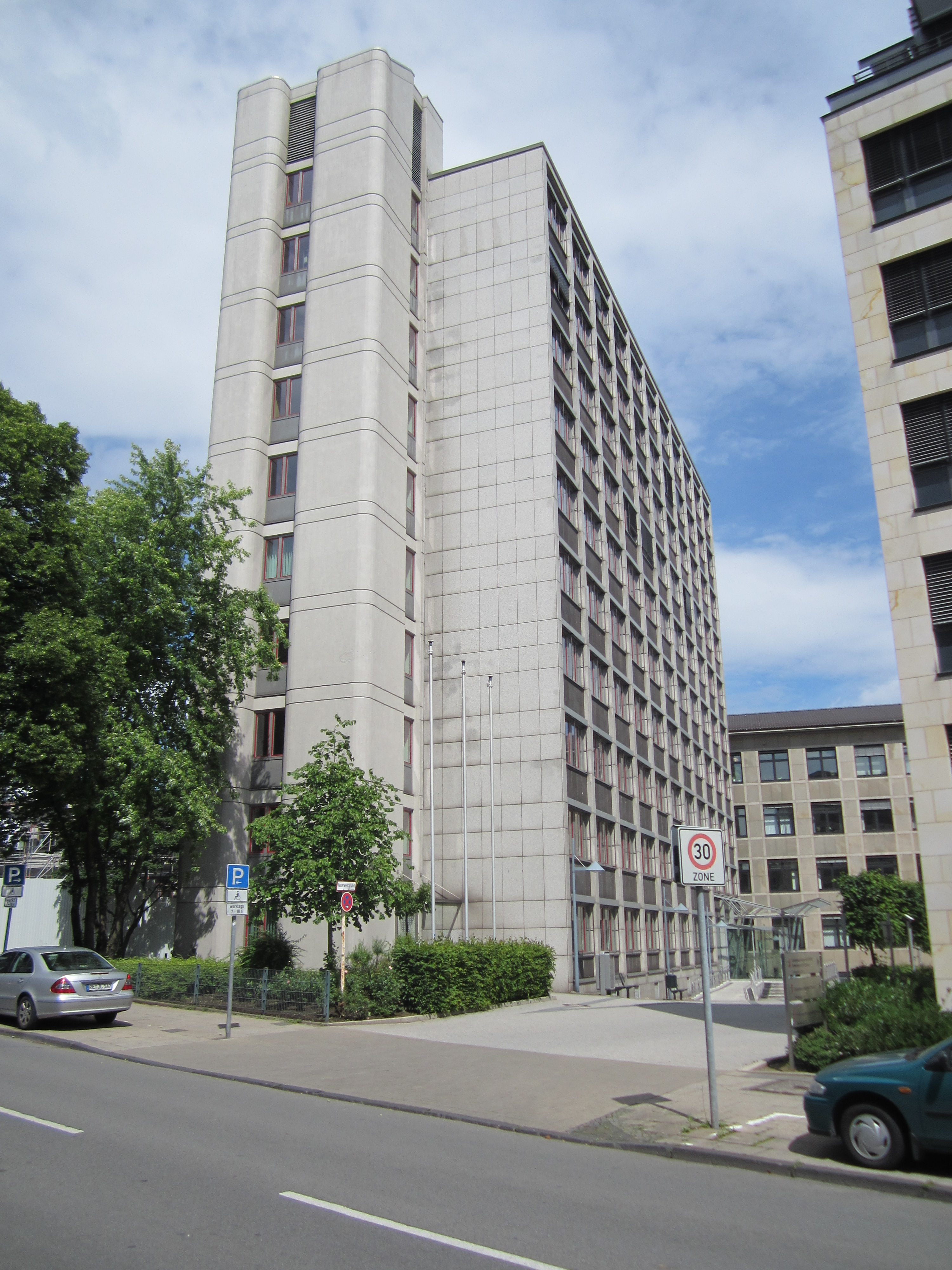 Arbeitsgericht Essen und Landessozialgericht Nordrhein-Westfalen in Essen-Rüttenscheid, Zweigertstraße 54